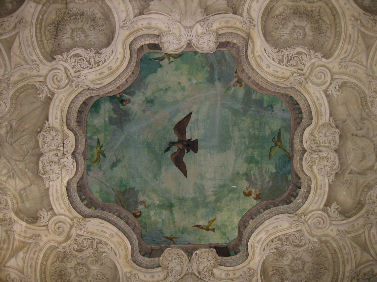 Loggia de l'Hôtel Ferraris de Nancy (Lorraine, France)